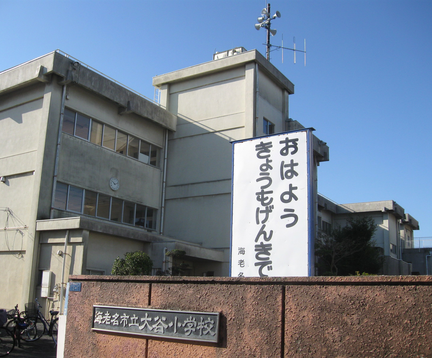 海老名市立大谷小学校（神奈川県海老名市）